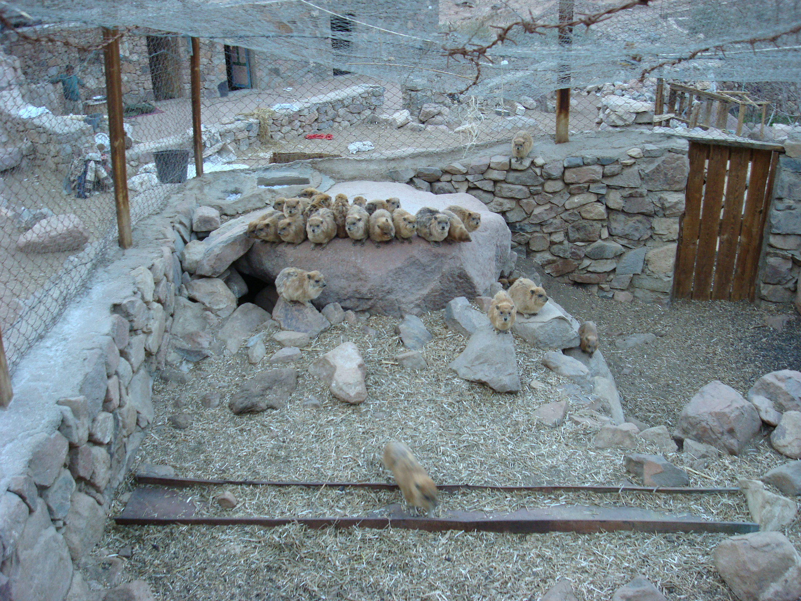 مزرعة لحيوان الوبر بوادي الاربعين بمحمية دير سانت كاترين